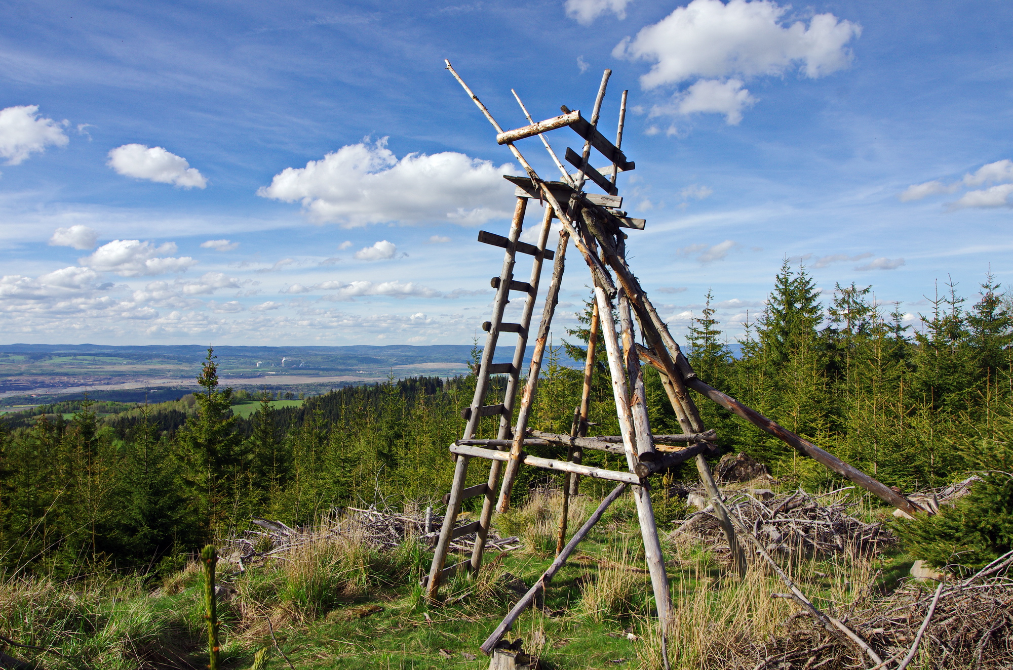 Lobezský vrch 805 m n. m., okres Sokolov